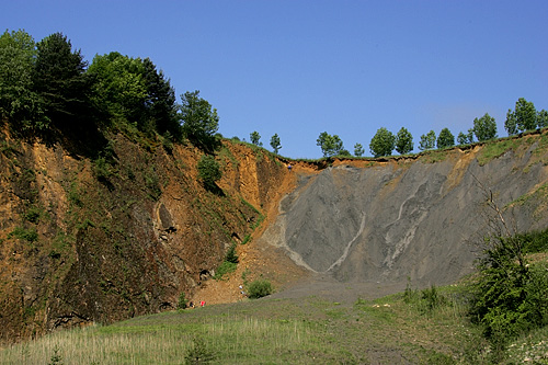 Das Naturschutzgebiet Andril in Liesberg